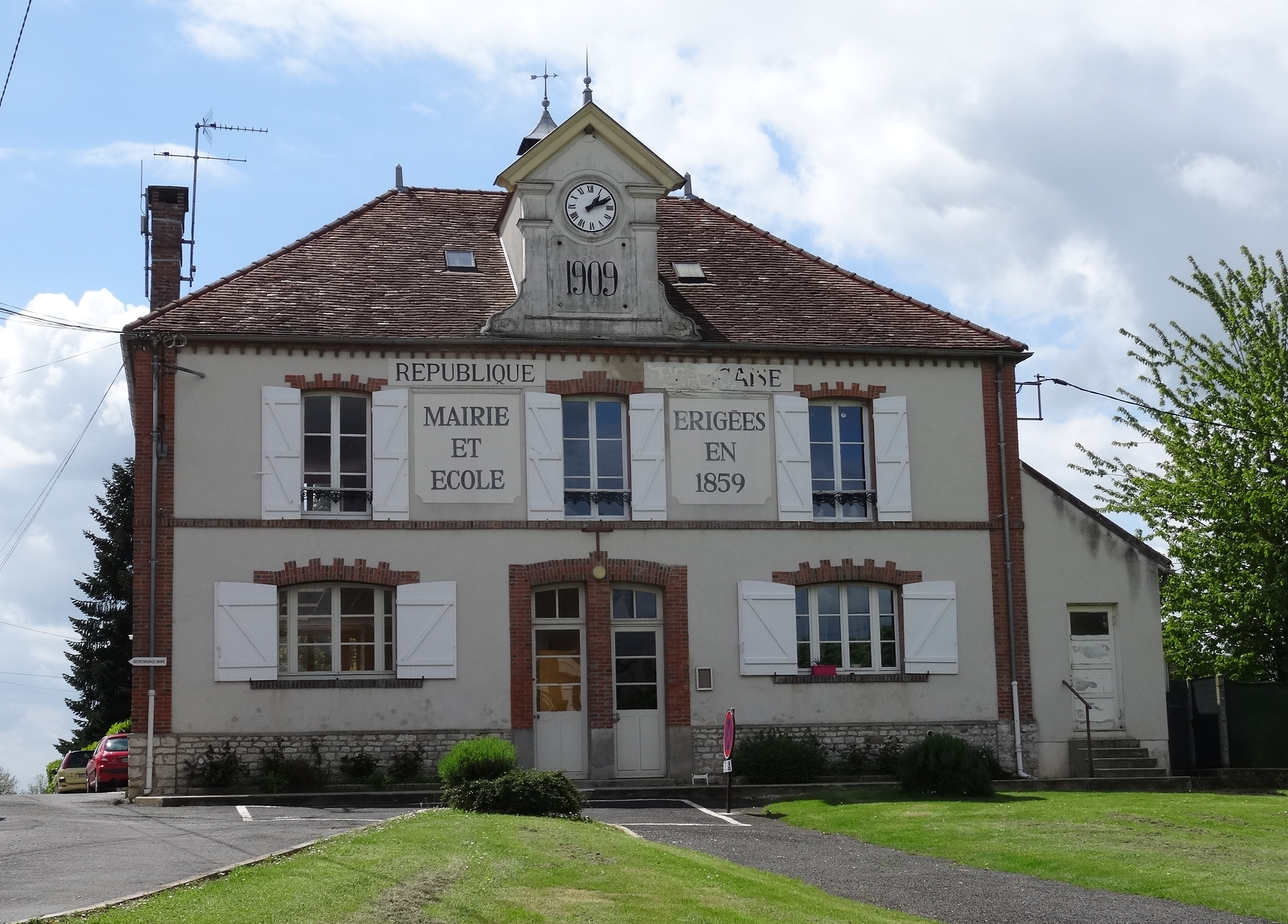 Mairie de Meigneux. (Seine-et-Marne, région Île-de-France).